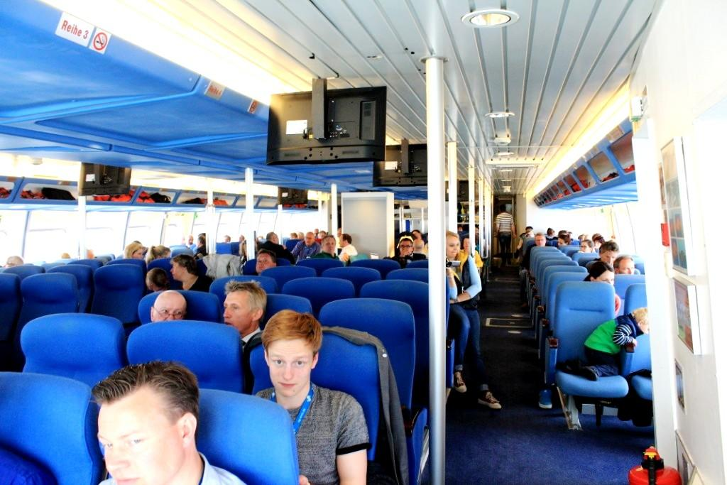 Nordlicht